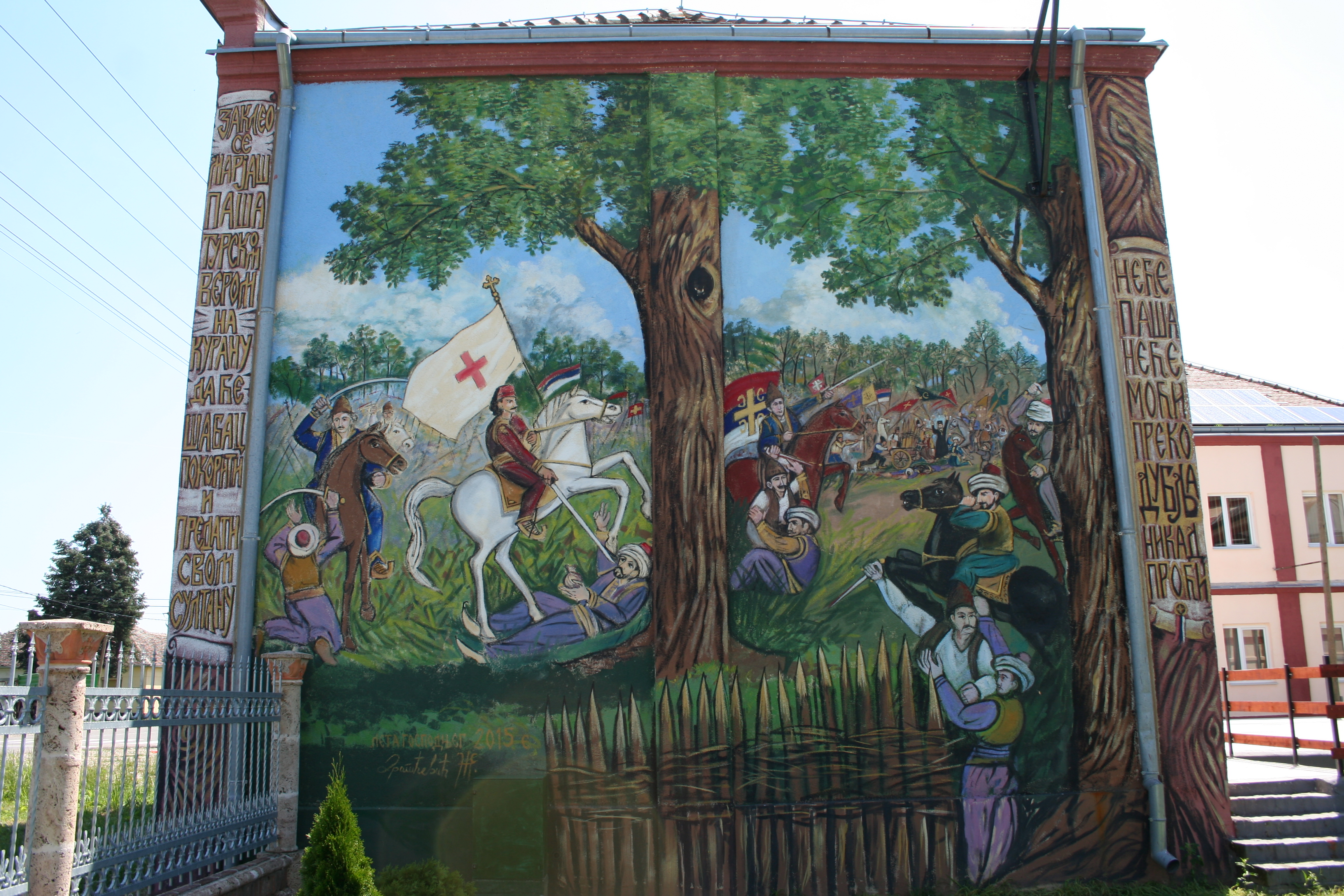 Crkva-spomen kosturnica Vaznesenja Gospodnjeg, Dublje